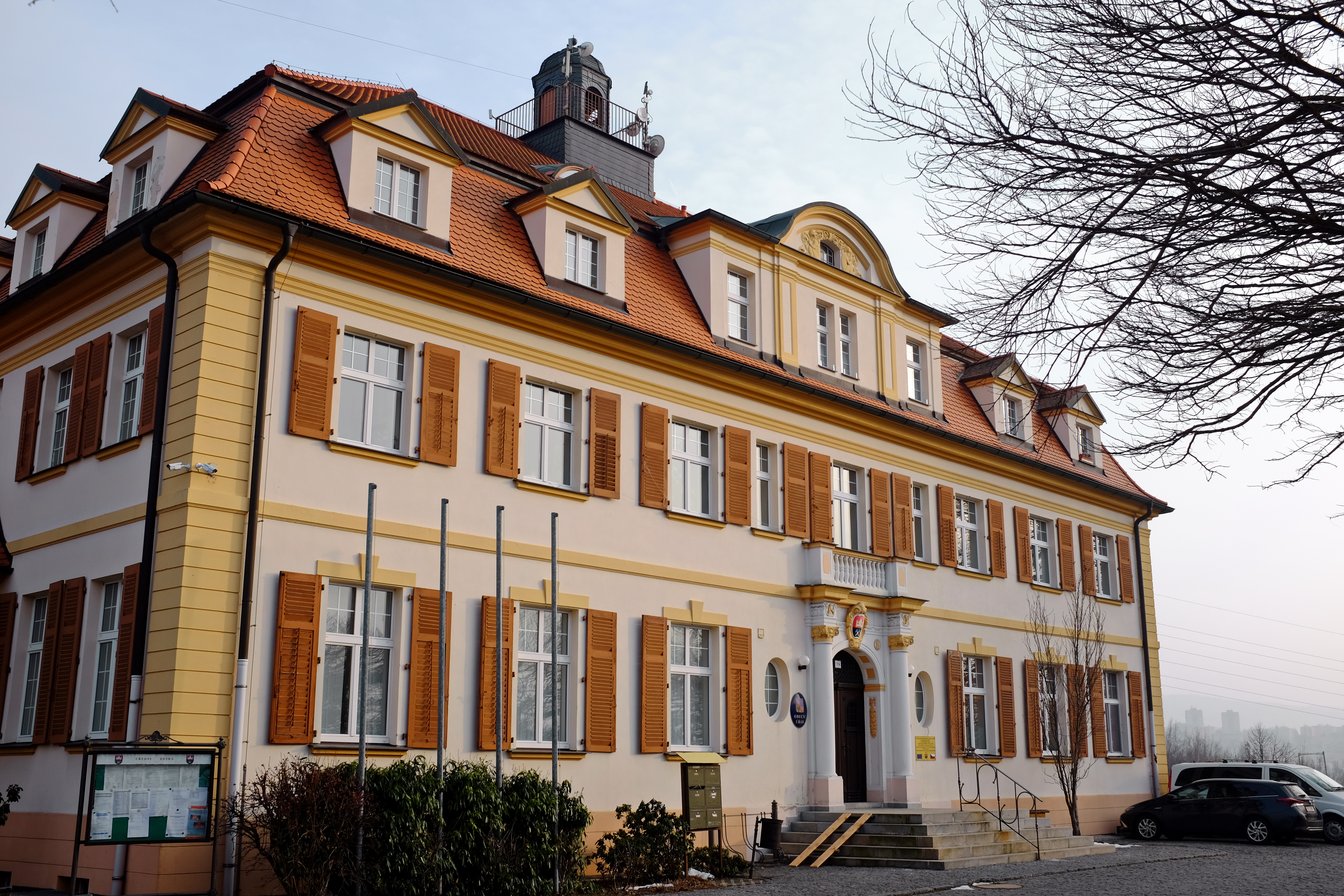 Královské Poříčí, Seebohmova vila, okres Sokolov